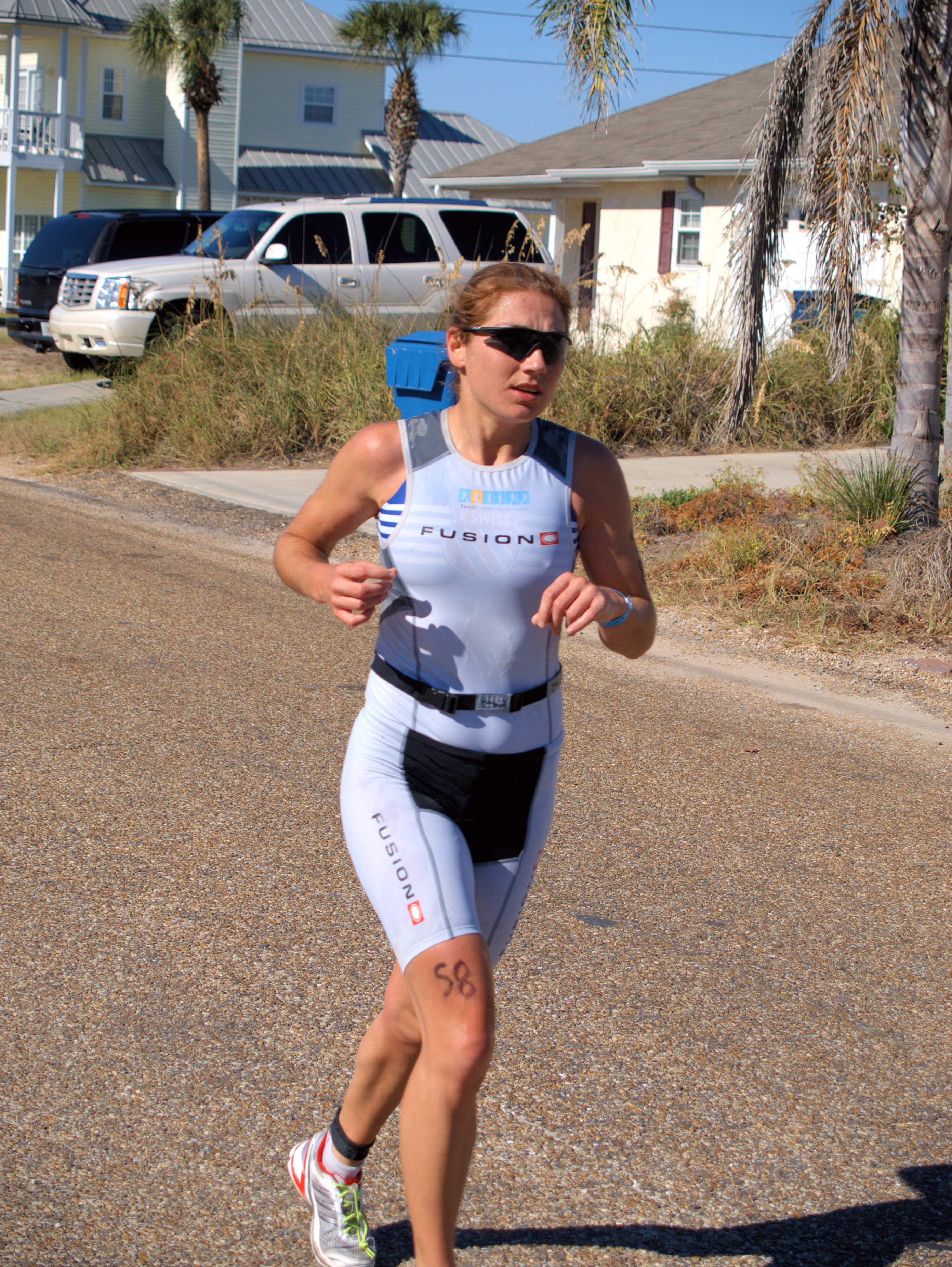 Karina Ottosen at Ironman Florida 2010